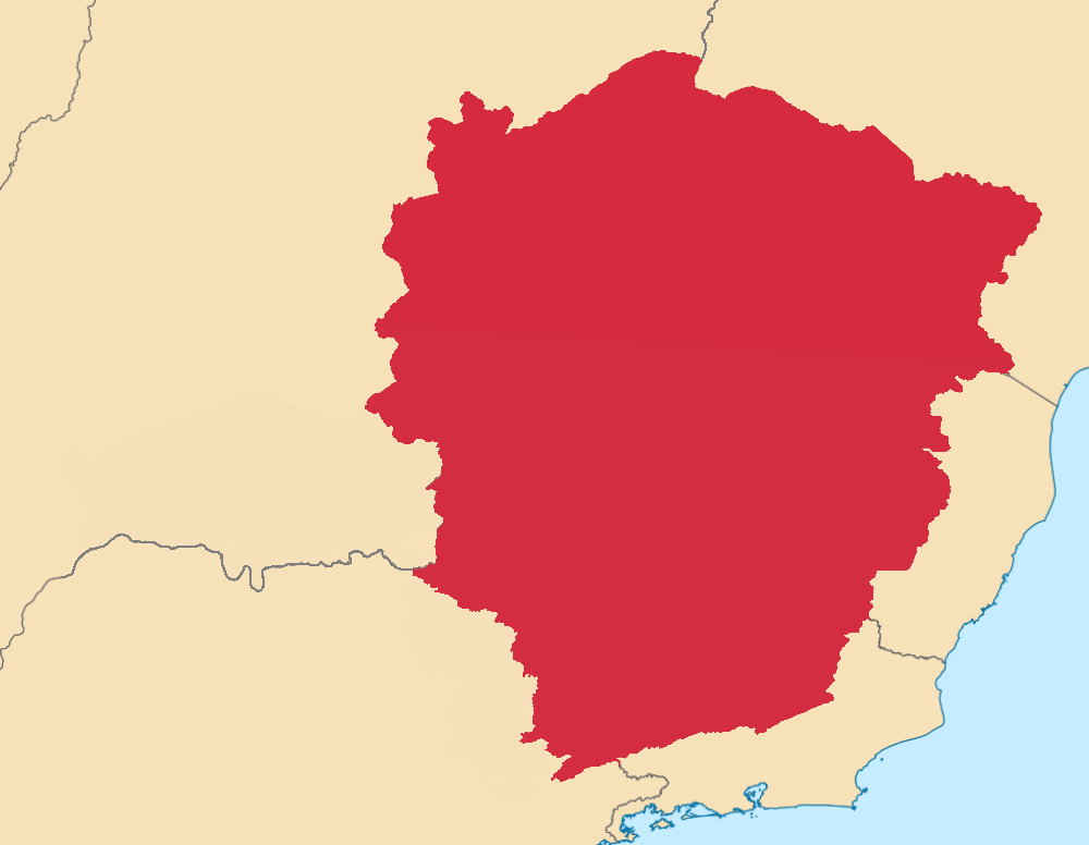 Inicialmente o território não incluía apenas a região correspondente ao Sertão da Farinha Podre(atual Triângulo Mineiro, integrada em 1816) e a margem direita do Rio Sapucaí e Rio Grande.